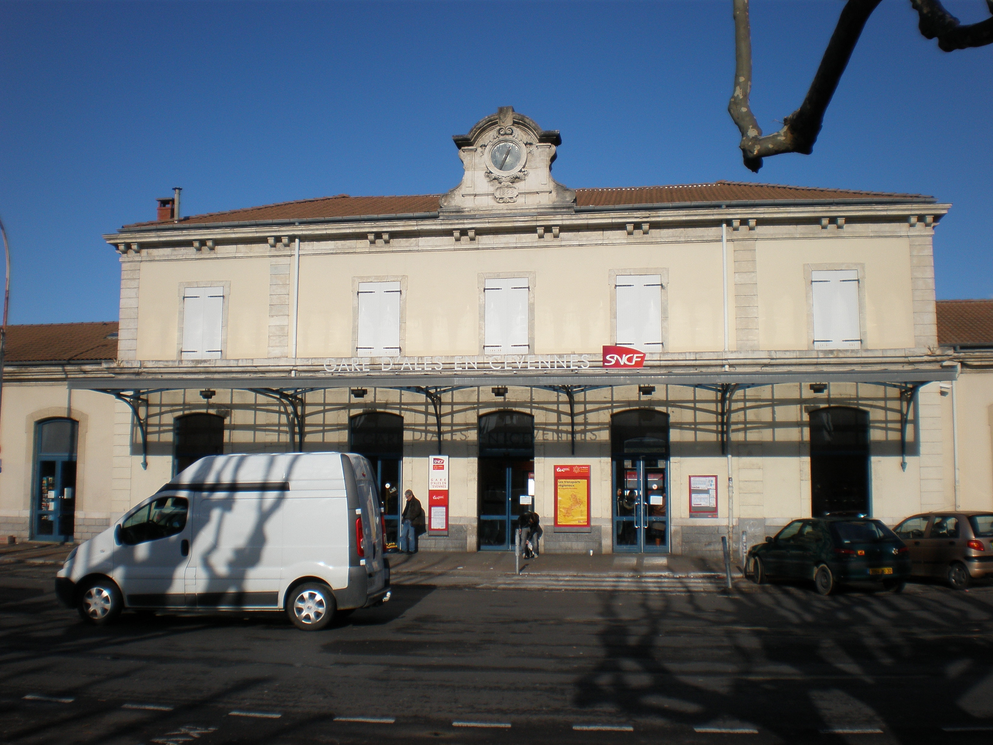 le bâtiment voyageurs de la gare d'Alès (Gard)